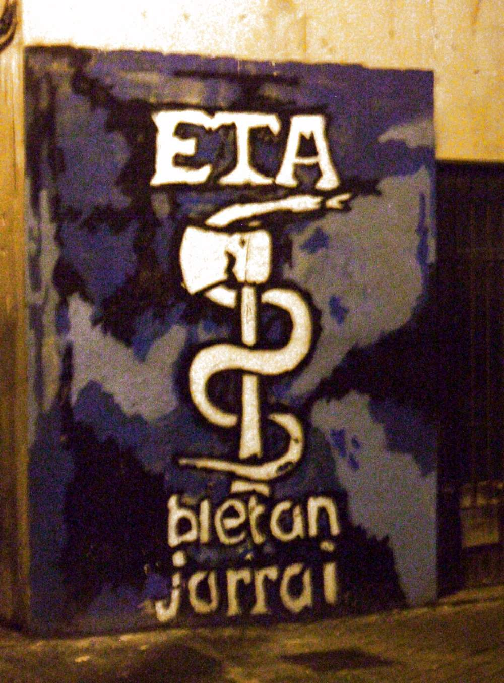 Anagrama de la organización terrorista ultranacionalista vasca ETA expuesto impunemente en la plaza mayor de Alsasua, Navarra, España